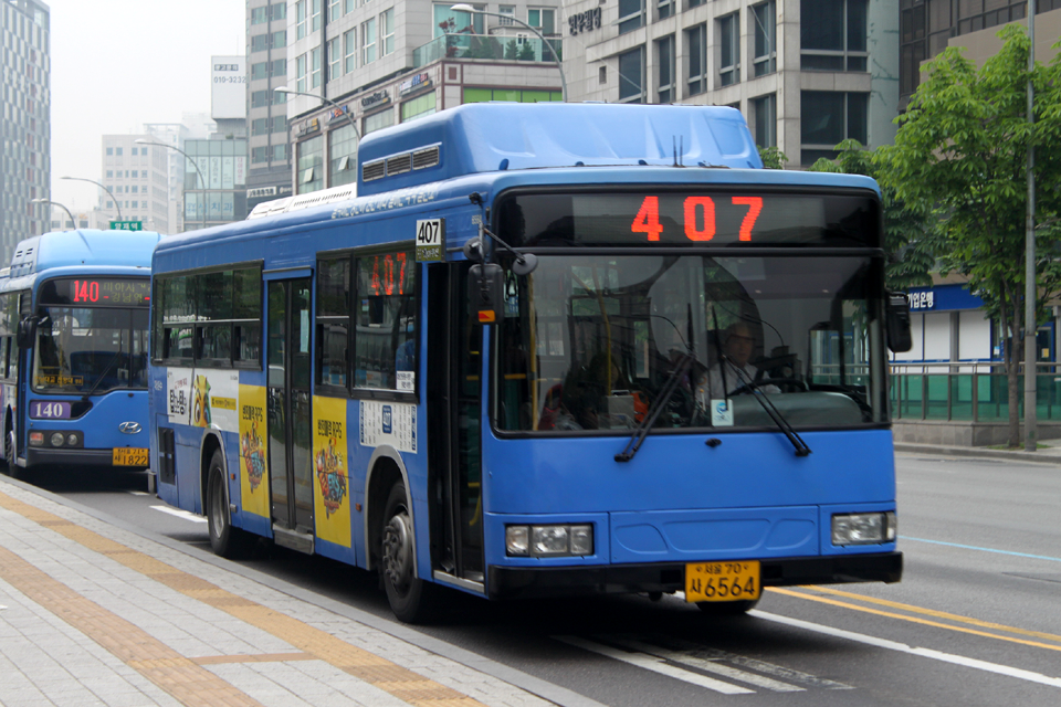 2007년산 BS110CN